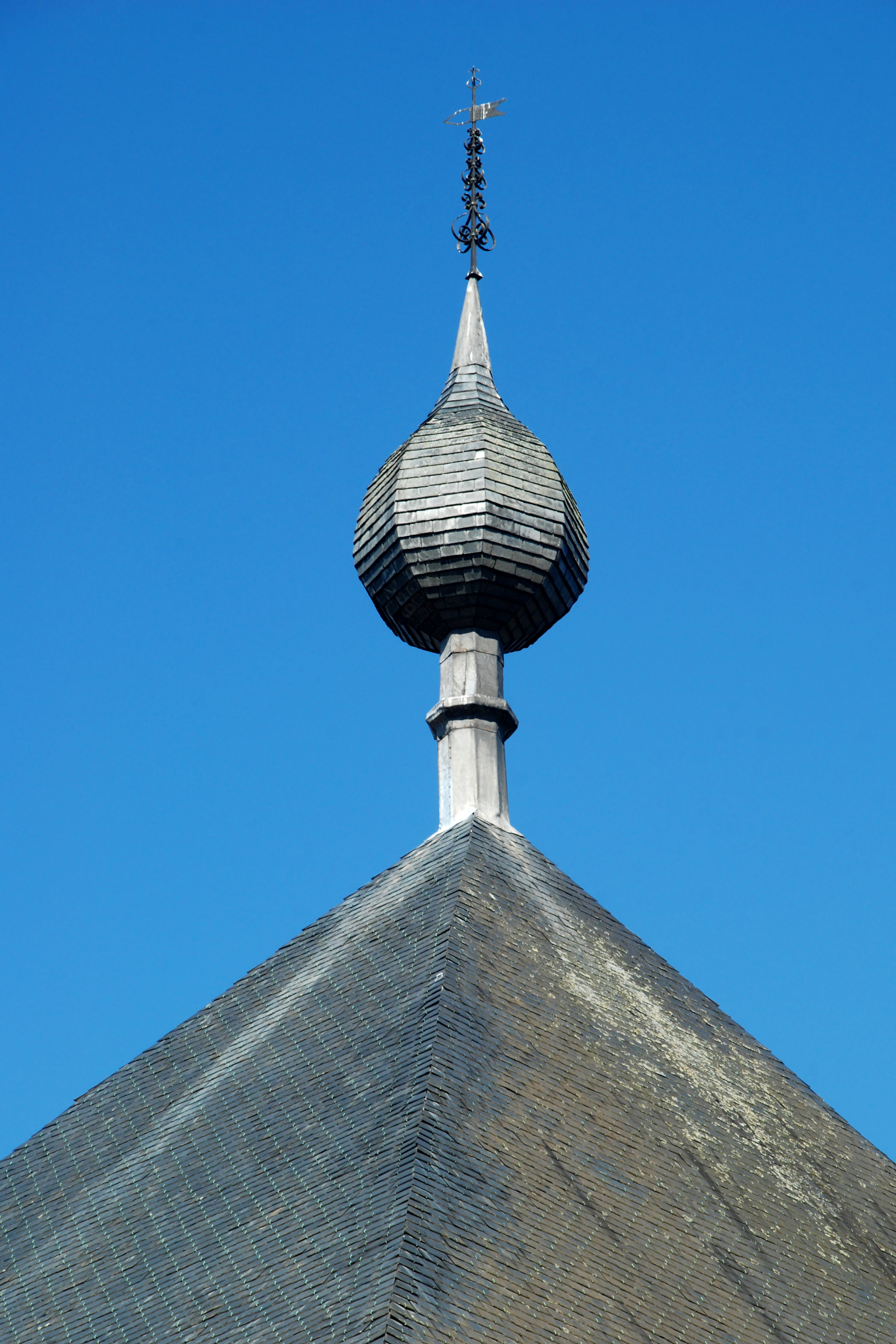 Belgium - Leuven - Groot Begijnhof - Convent van Chièvres - Benedenstraat 39